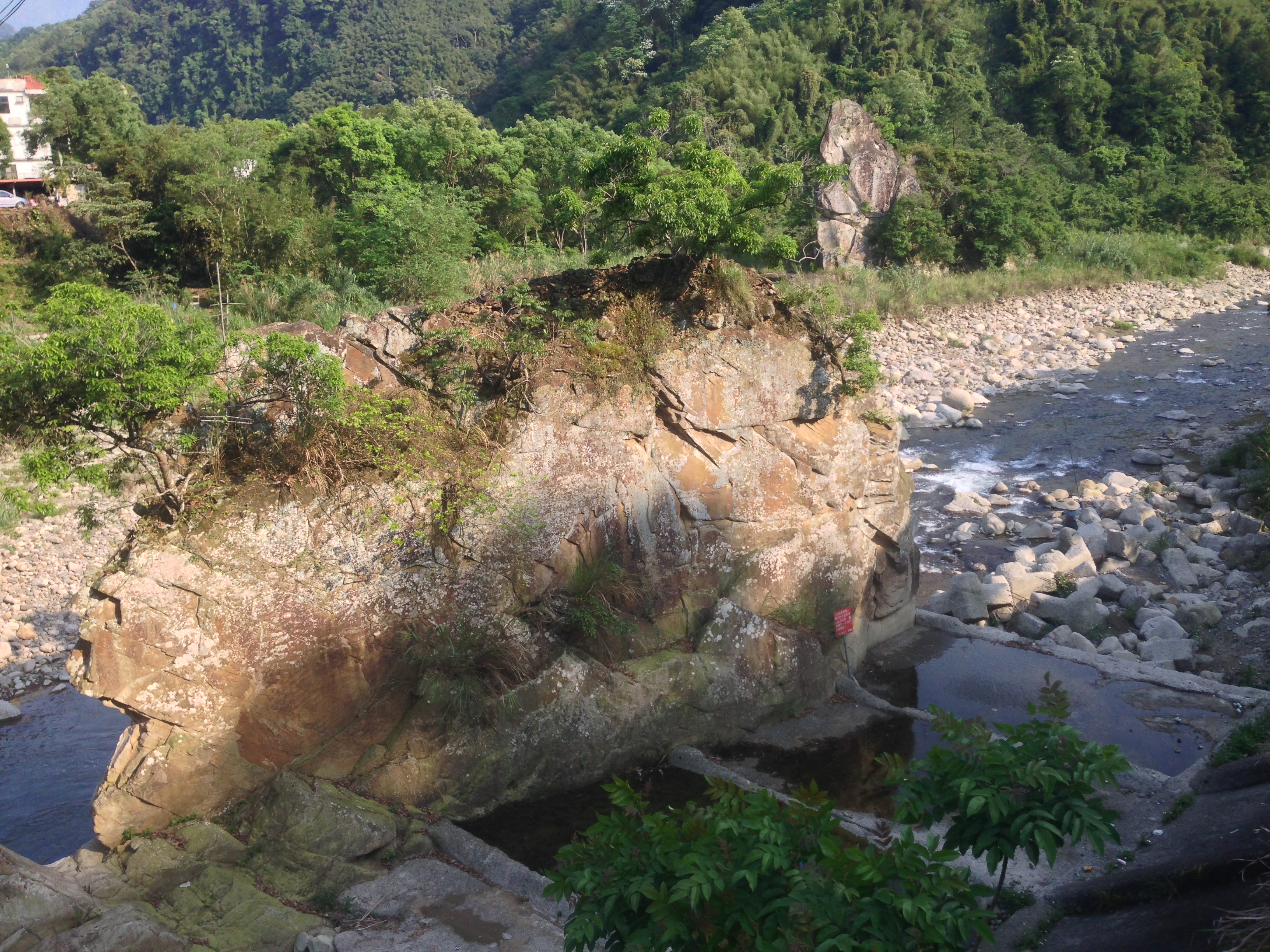 中文（台灣）: 油羅溪尖石公與尖石母